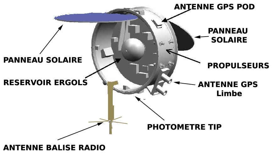 Schéma du satellite FORMOSAT-3 / COSMIC (légendes en francais)